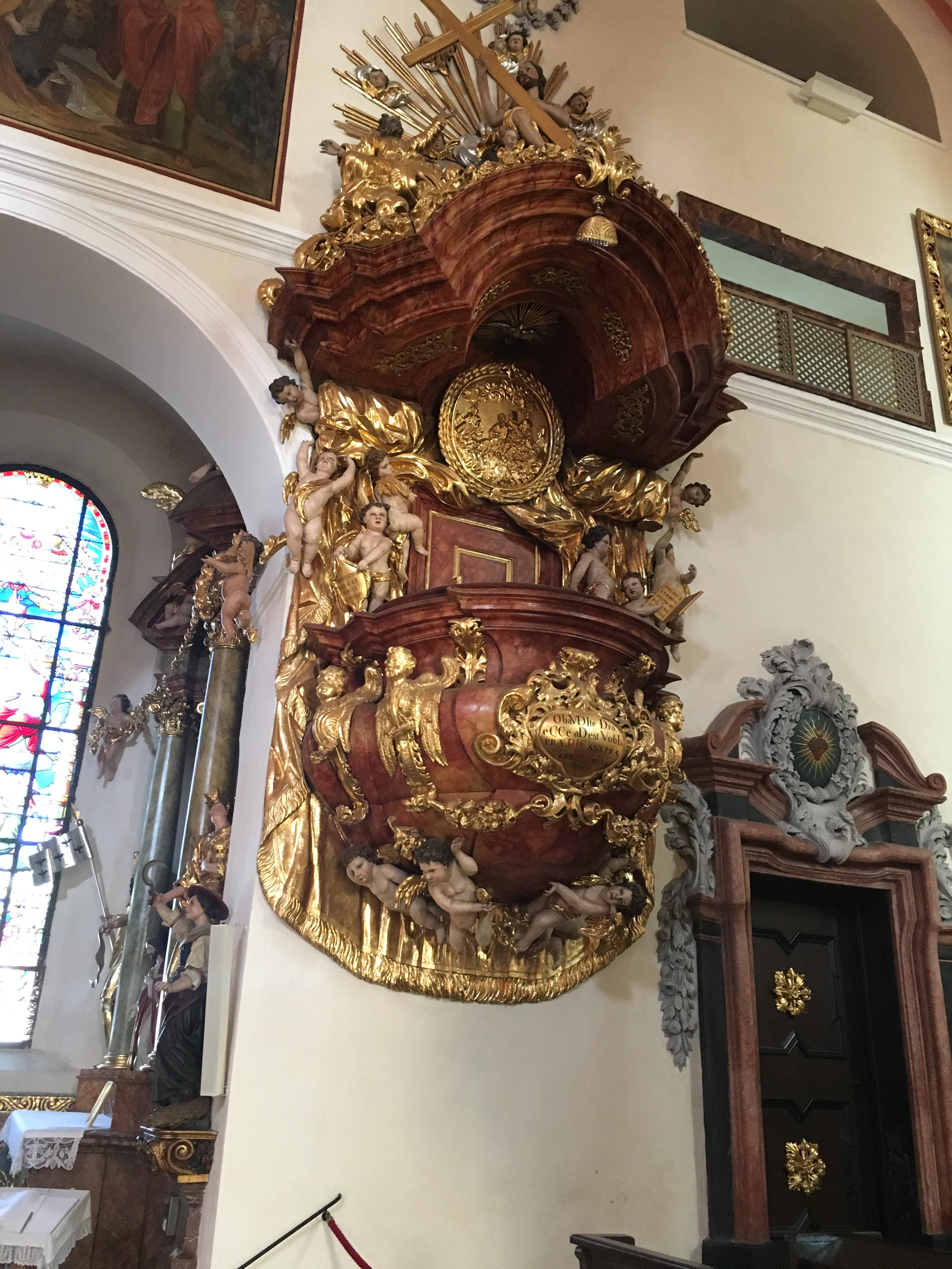 St Maria Magdalena